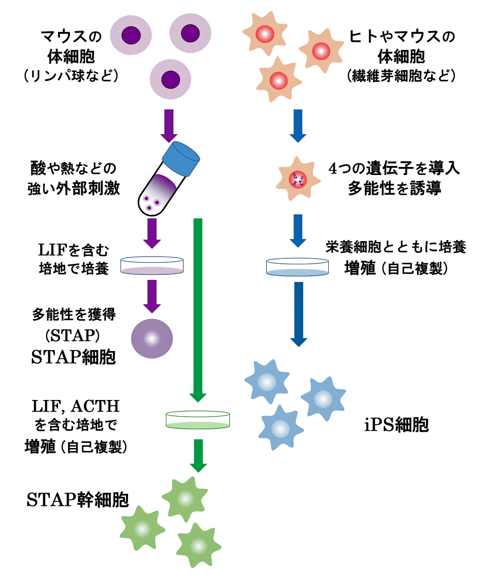 STAP細胞とiPS細胞の違い